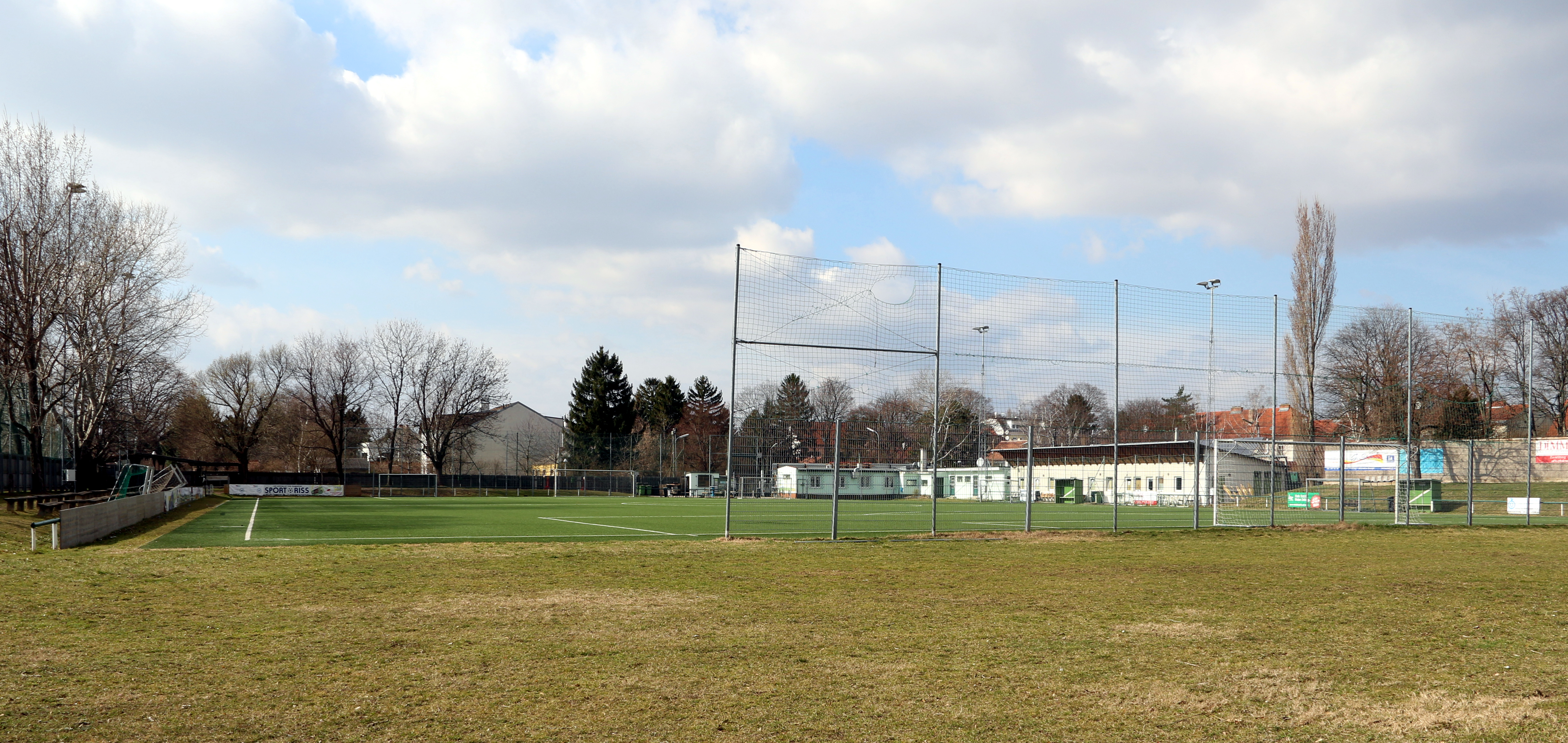 Sportplatz des A11-R. Oberlaa in Wien-Favoriten.